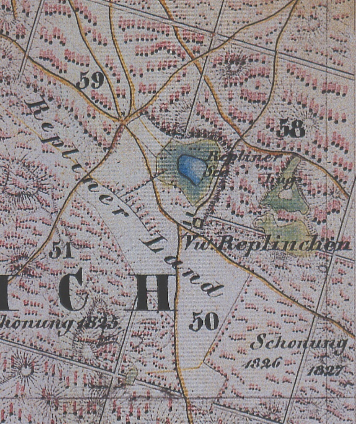 Das Vorwerk Replinchen auf dem Urmesstischblatt 3947 Baruth von 1841, südlich des Replinchener See gelegen, heute Gemarkung Freidorf, Gemeinde Halbe, Landkreis Dahme-Spreewald, Brandenburg